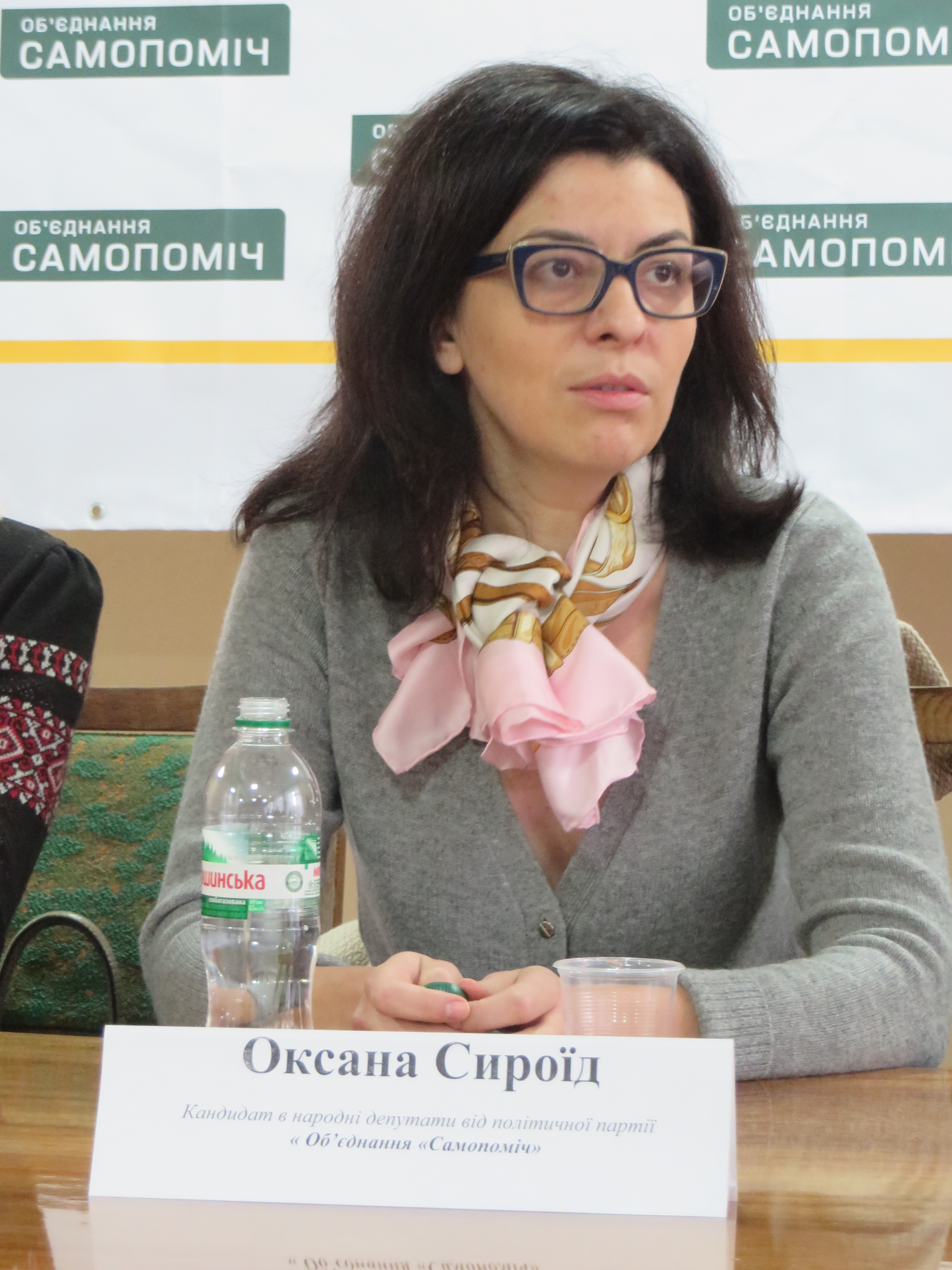 Оксана Сироїд, зустріч із виборцями в Чернігові, 7 жовтня 2014